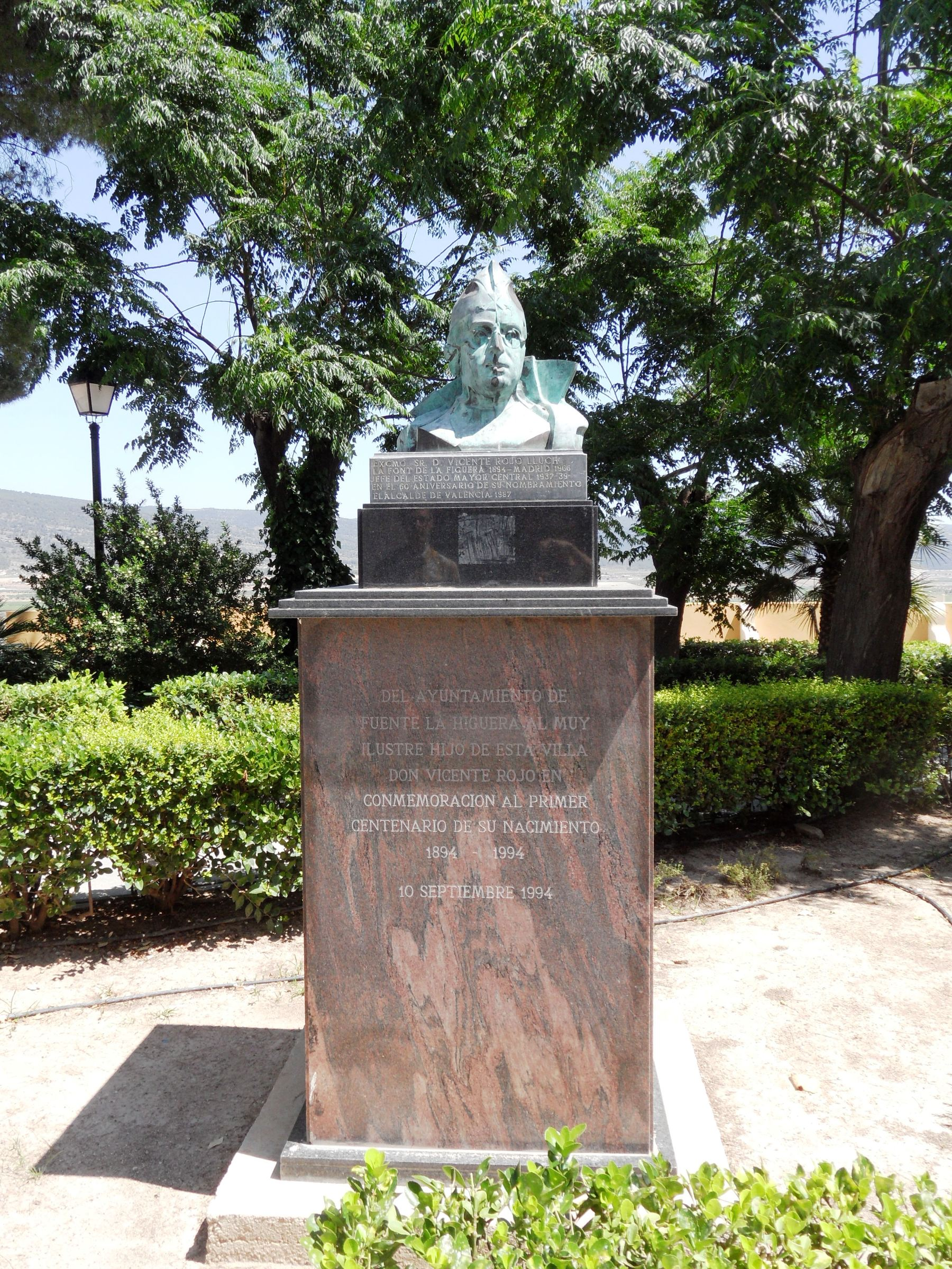 Monument al militar republicà Vicente Rojo a la Font de la Figuera.